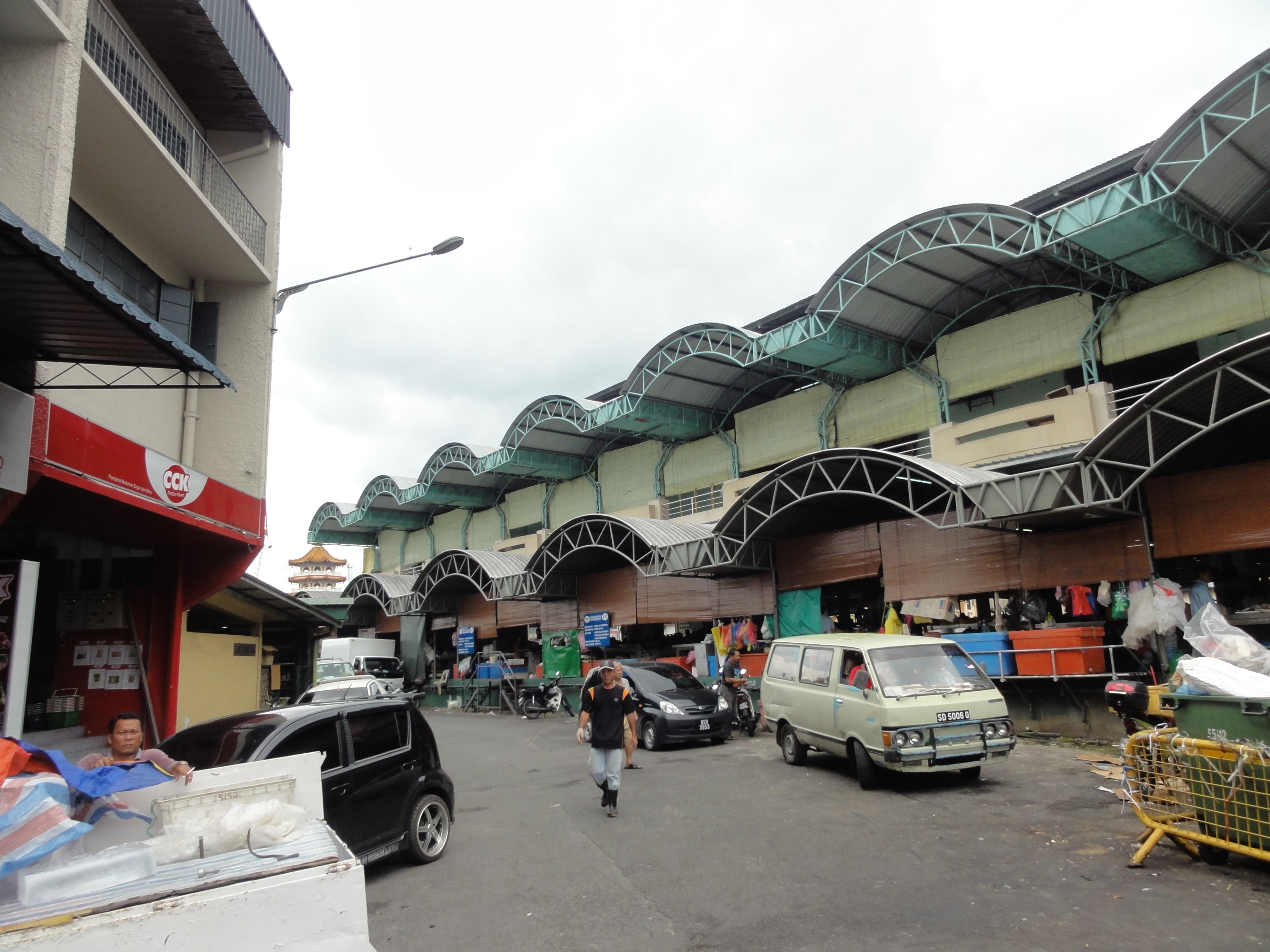 Behind Sibu Market